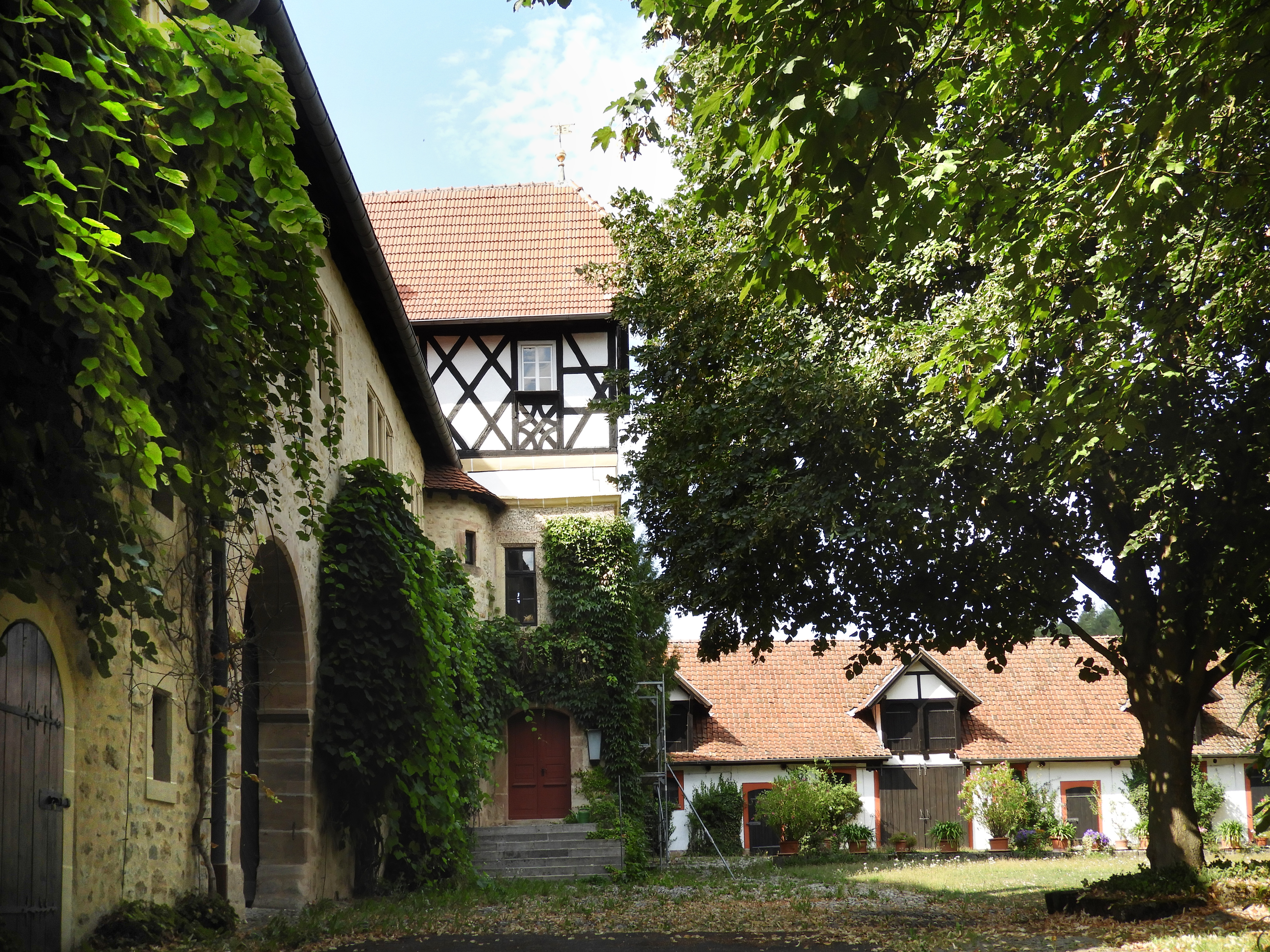 Der südliche Eingangsbereich Das ehemalige Schloss der Herren von Capellan steht am westlichen Ortsrand Lüderbachs. Das um 1560 erbaute Gutshaus erhebt sich in massivem Mauerwerk über einem längsrechteckigen Grundriss in zwei Geschossen mit einem in der Mittelachse eingefügten Querriegel, der das Treppenhaus beherbergt. Das seitlich angefügte Wirtschaftsgebäude stammt aus dem ersten Drittel des 20. Jahrhunderts. Das Schloss ist ein Kulturdenkmal aus künstlerischen, geschichtlichen und städtebaulichen Gründen. Lüderbach ist ein Ortsteil der Gemeinde Ringgau im nordhessischen Werra-Meißner-Kreis.